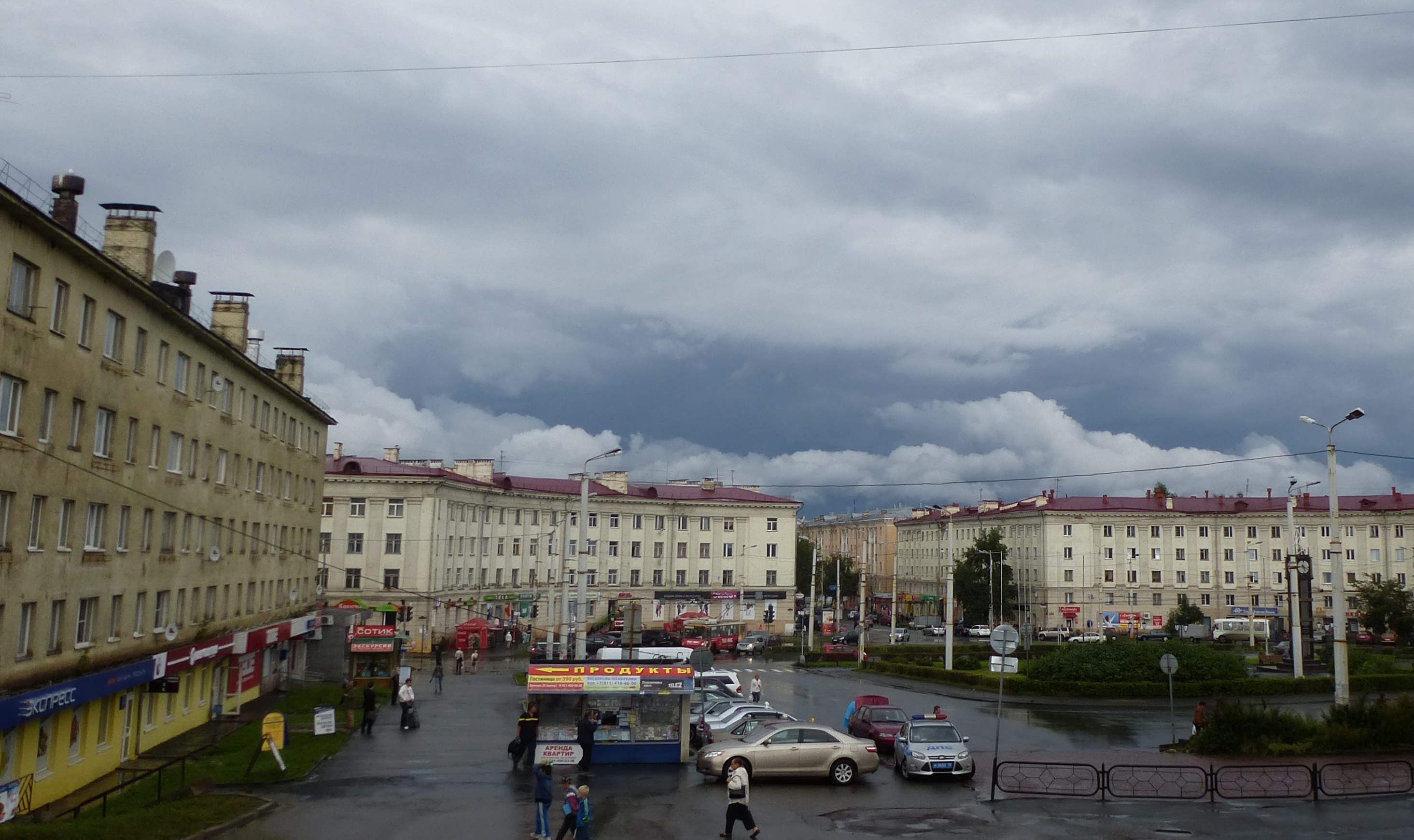 Площадь Гагарина в Петрозаводске